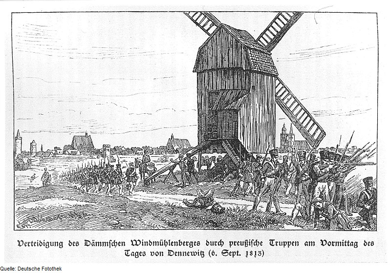 Original image description from the Deutsche Fotothek Jüterbog. Verteidigung des Dämmschen Mühlenberges durch preußische Truppen 1813, aus: Sturtevant, Erich: Chronik der Stadt Jüterbog, 1935